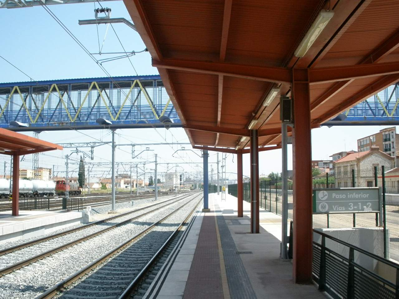 Estación de ferrocarril de Venta de Baños (Palencia)